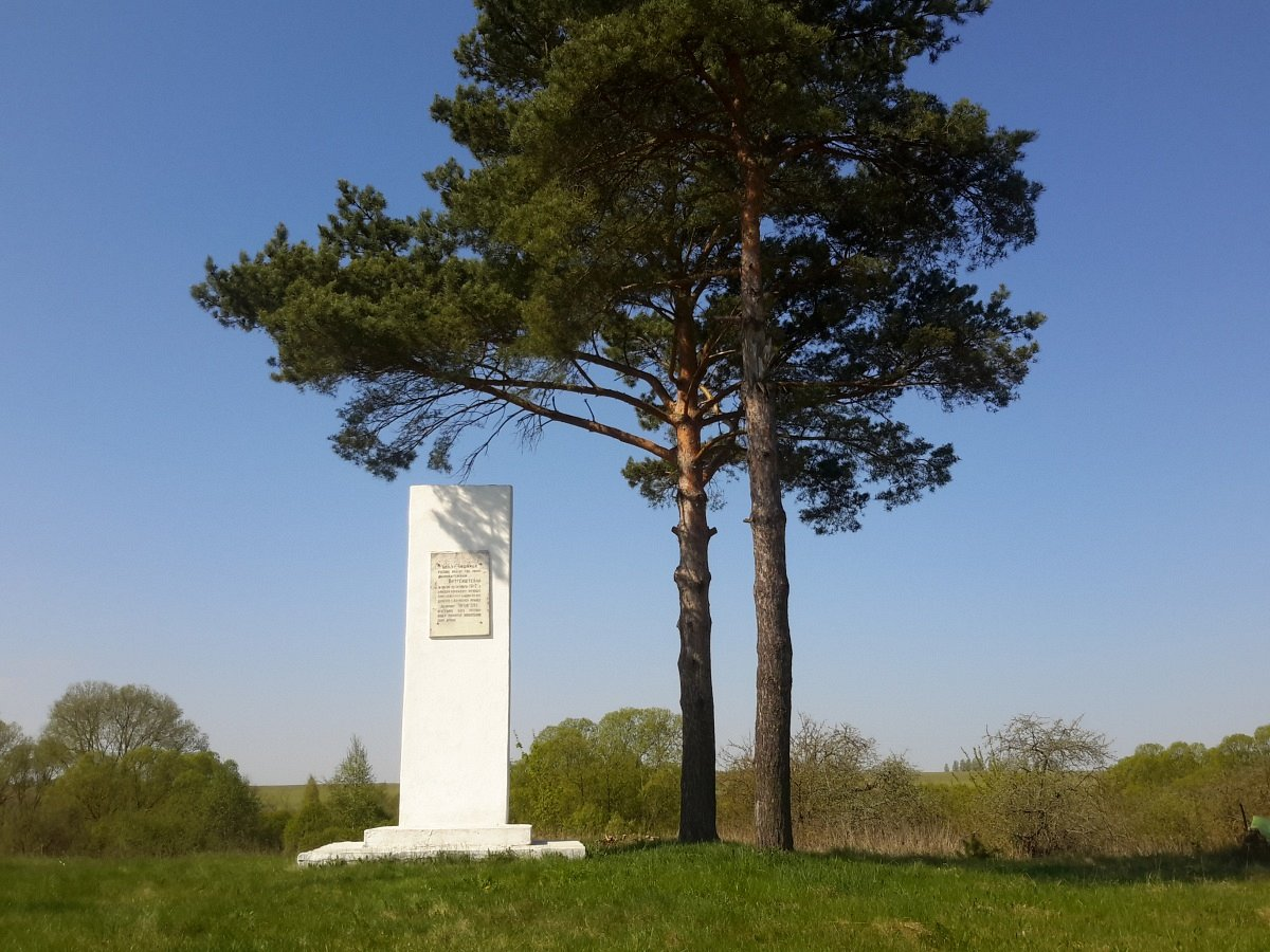 Копцевічы. Стэла у памяць аб бітве 1812 г.